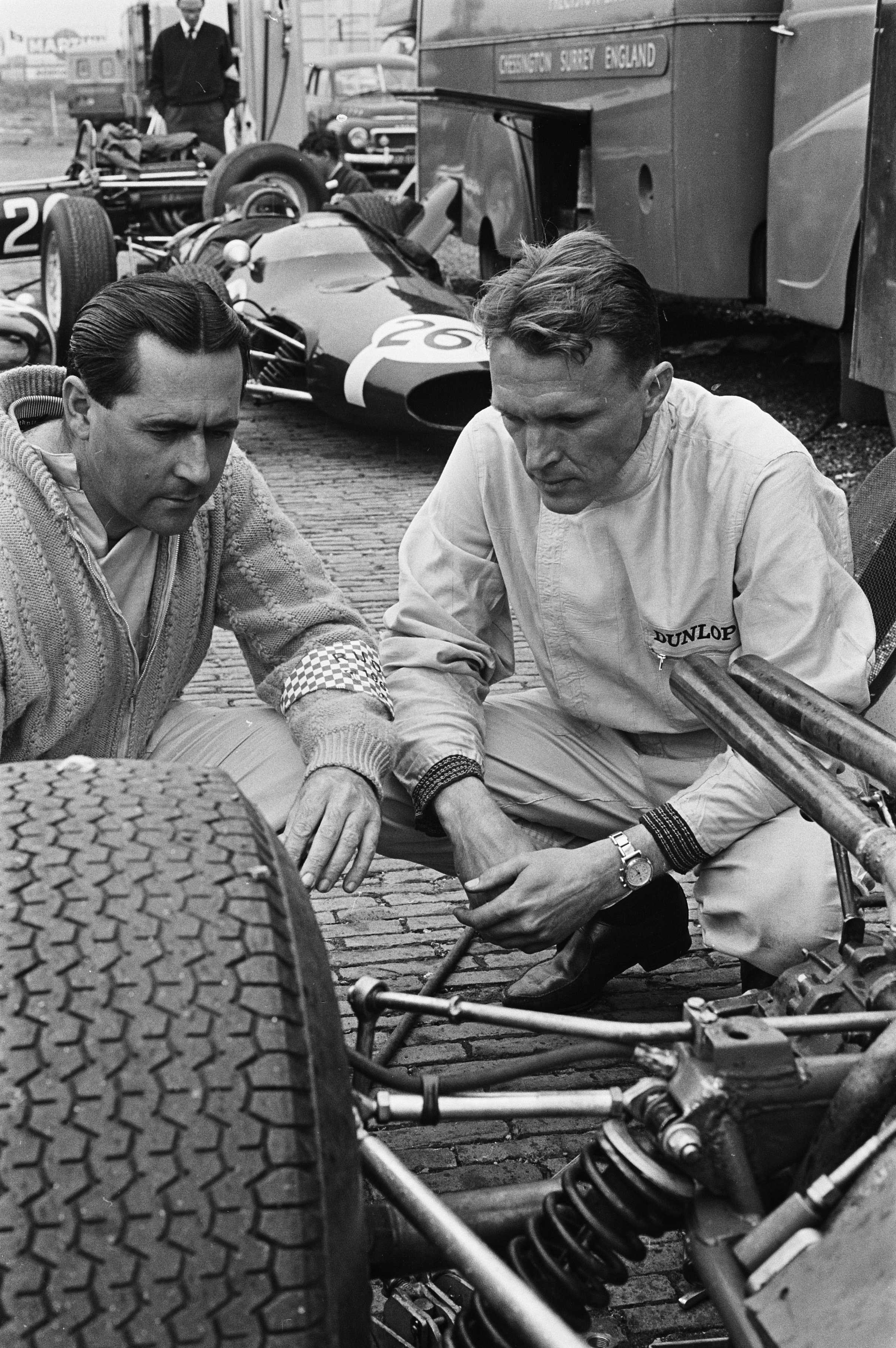 Training Grand Prix te Zandvoort, Dan Gurney (rechts) en Jack Brabham tijdens training in conferentie.